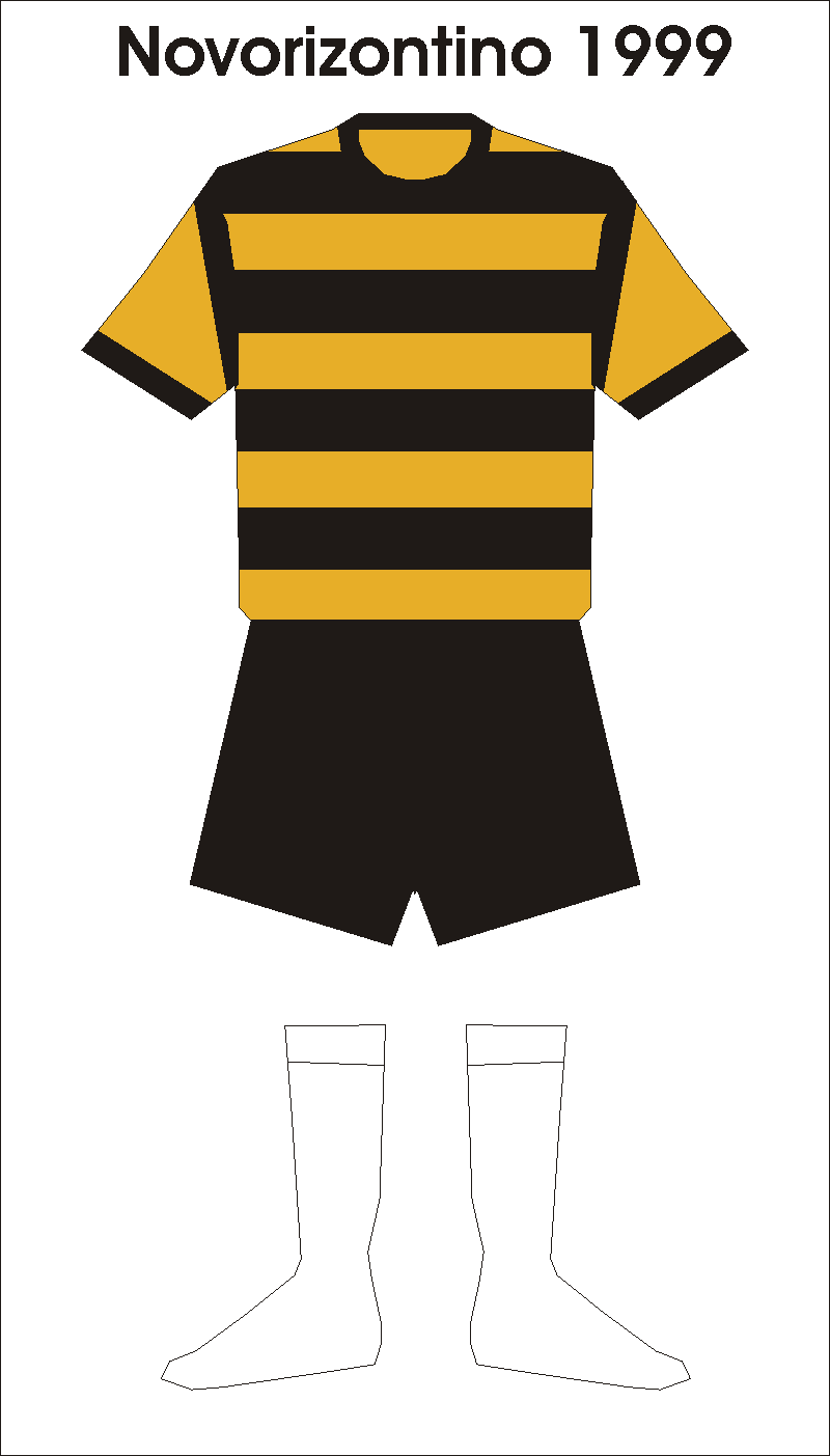 1999 Grêmio Esportivo Novorizontino home kit.